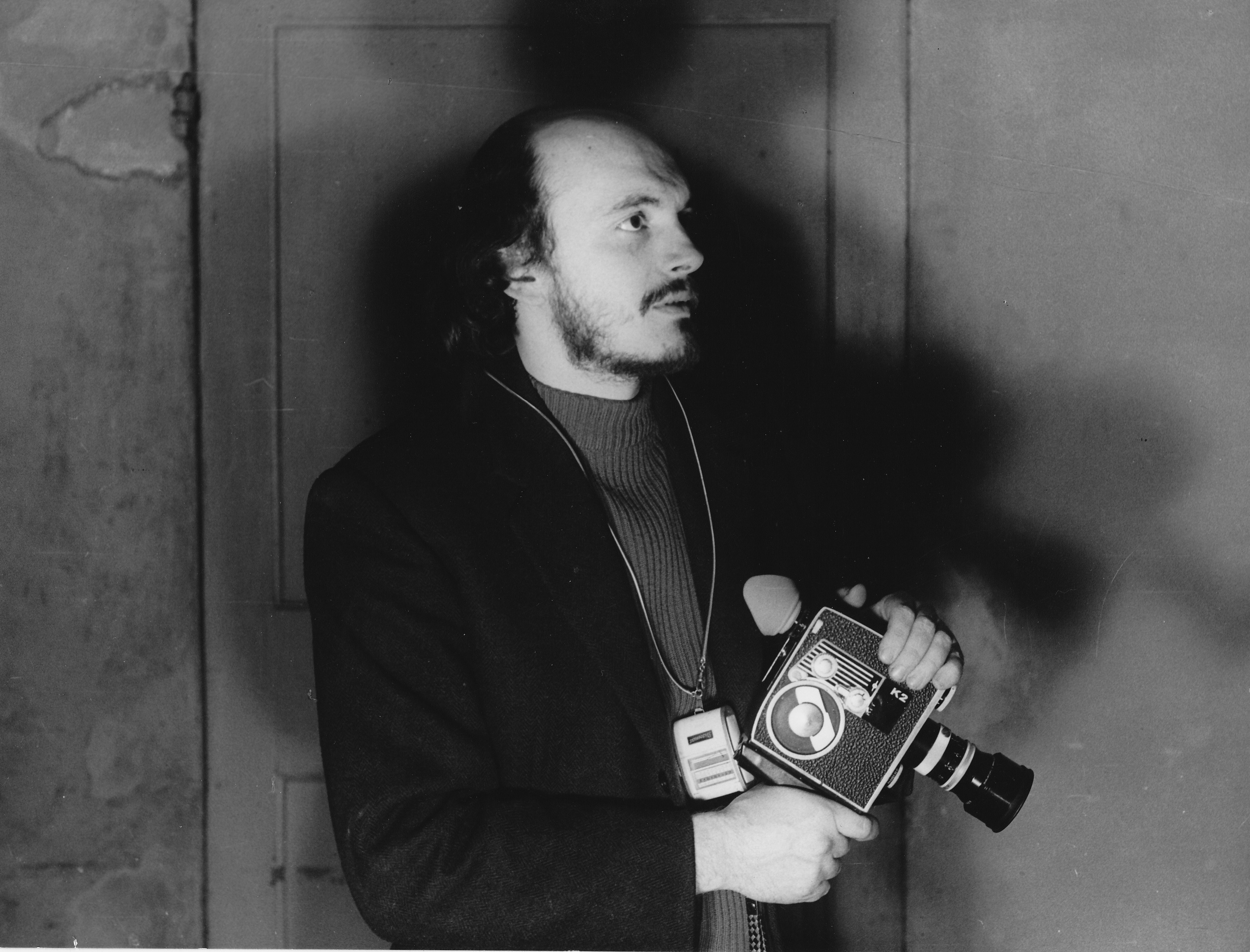 Il regista Mauro Mingardi sul set de "Il Viaggio", 1971